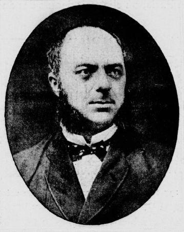 Portrait de Charles Zidler